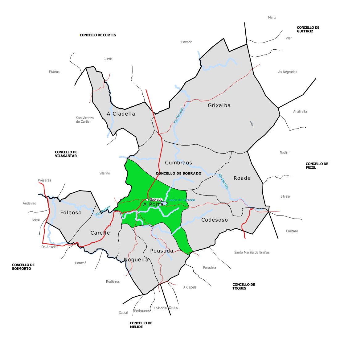 Mapa da parroquia da Porta no concello de Sobrado (Galiza).